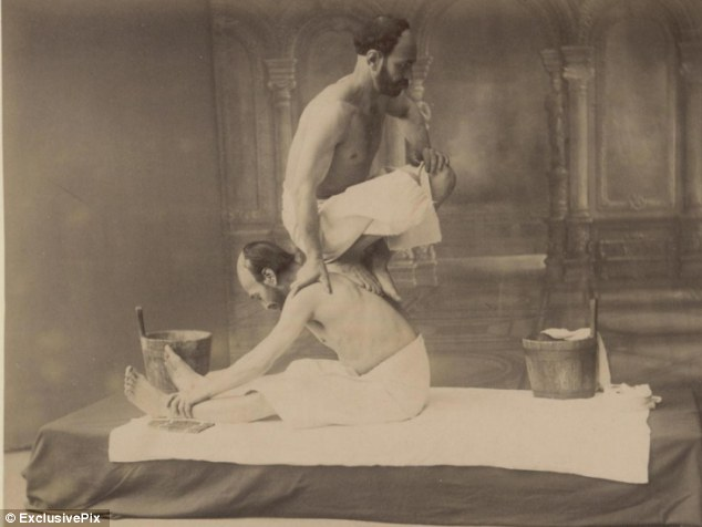 chłop masazysta